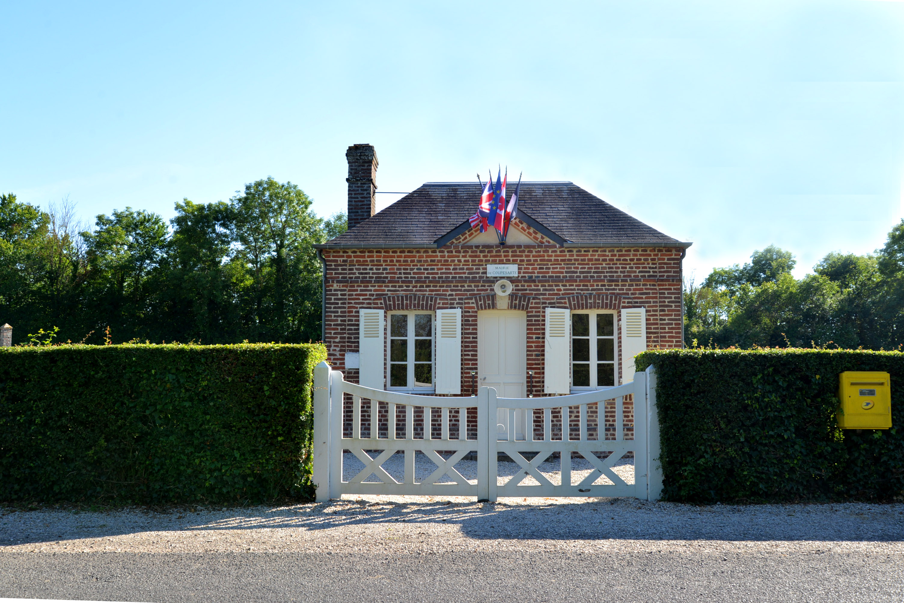 Coupesarte (Calvados)